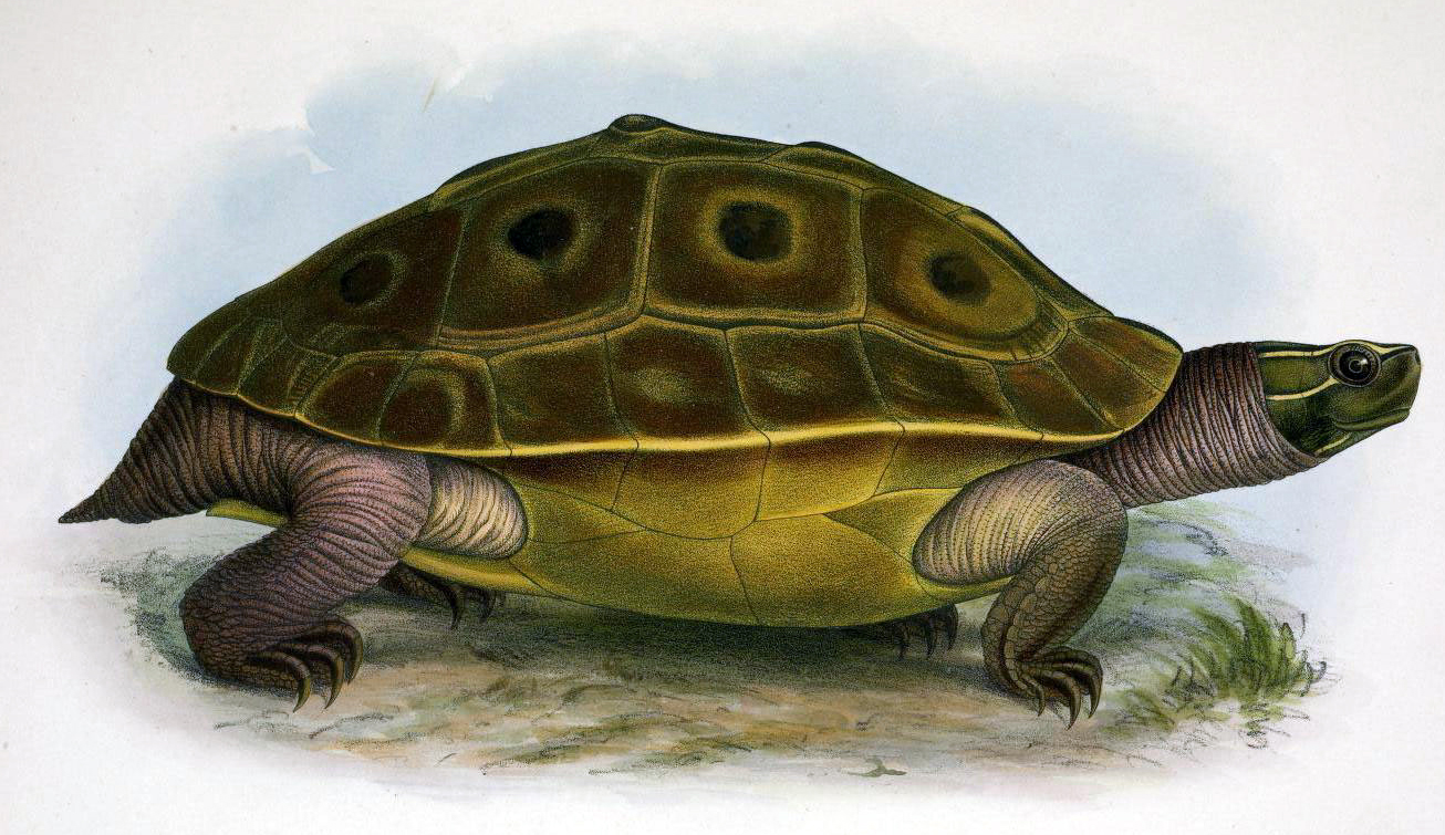 Burmese eyed turtle.